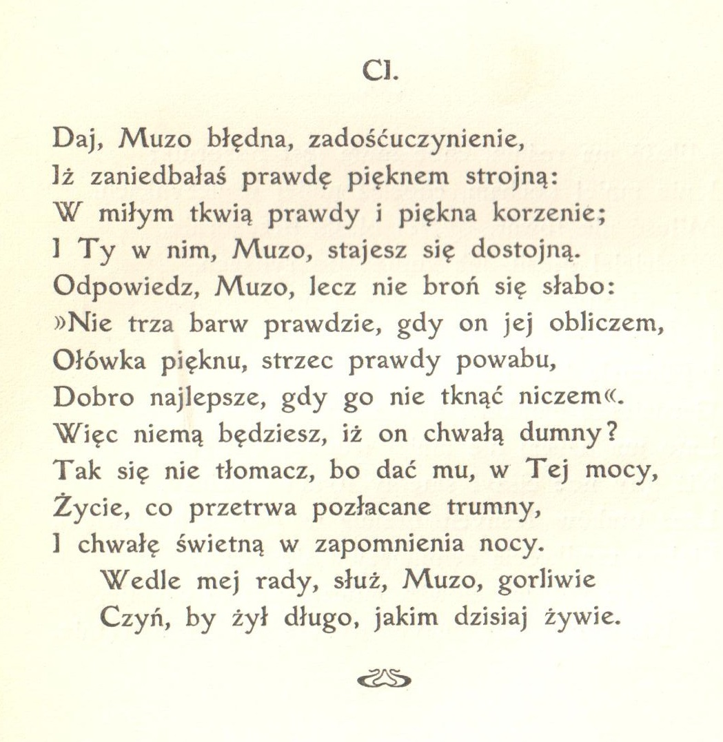 Sonety Shakespeare'a I-CXXXIV i CXXXVII-CLIV tłumaczenie Maria Sułkowska (MUS) sonet 100 (strona 114)